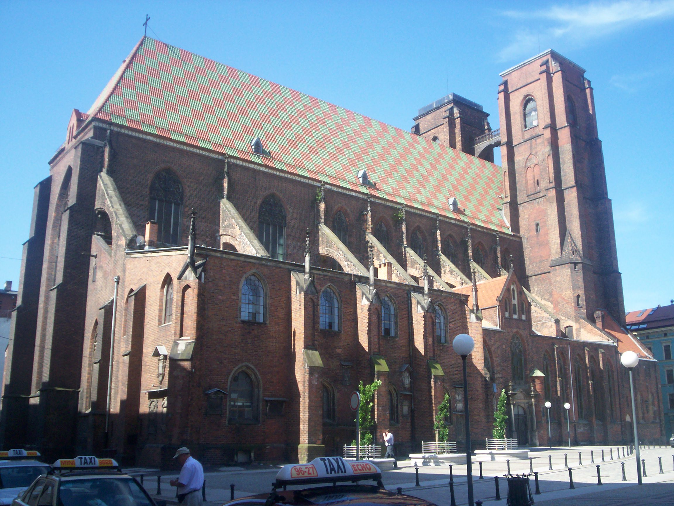 Wrocław, katedra św Marii Magdaleny.